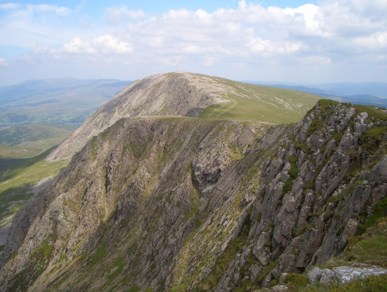 mynydd moel